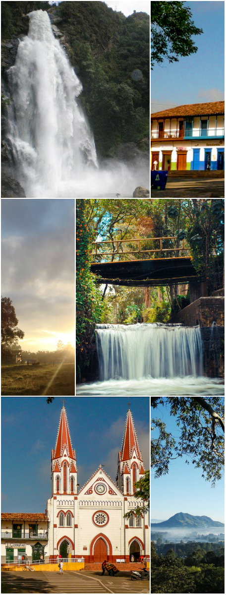 la ceja ant